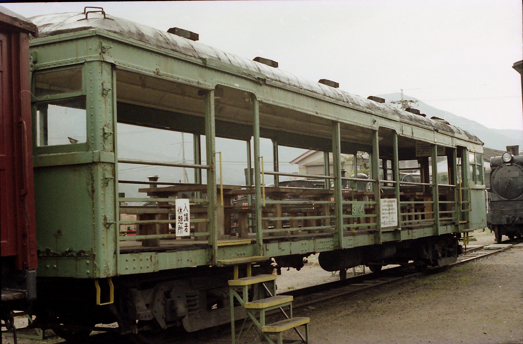 加悦SL広場-01